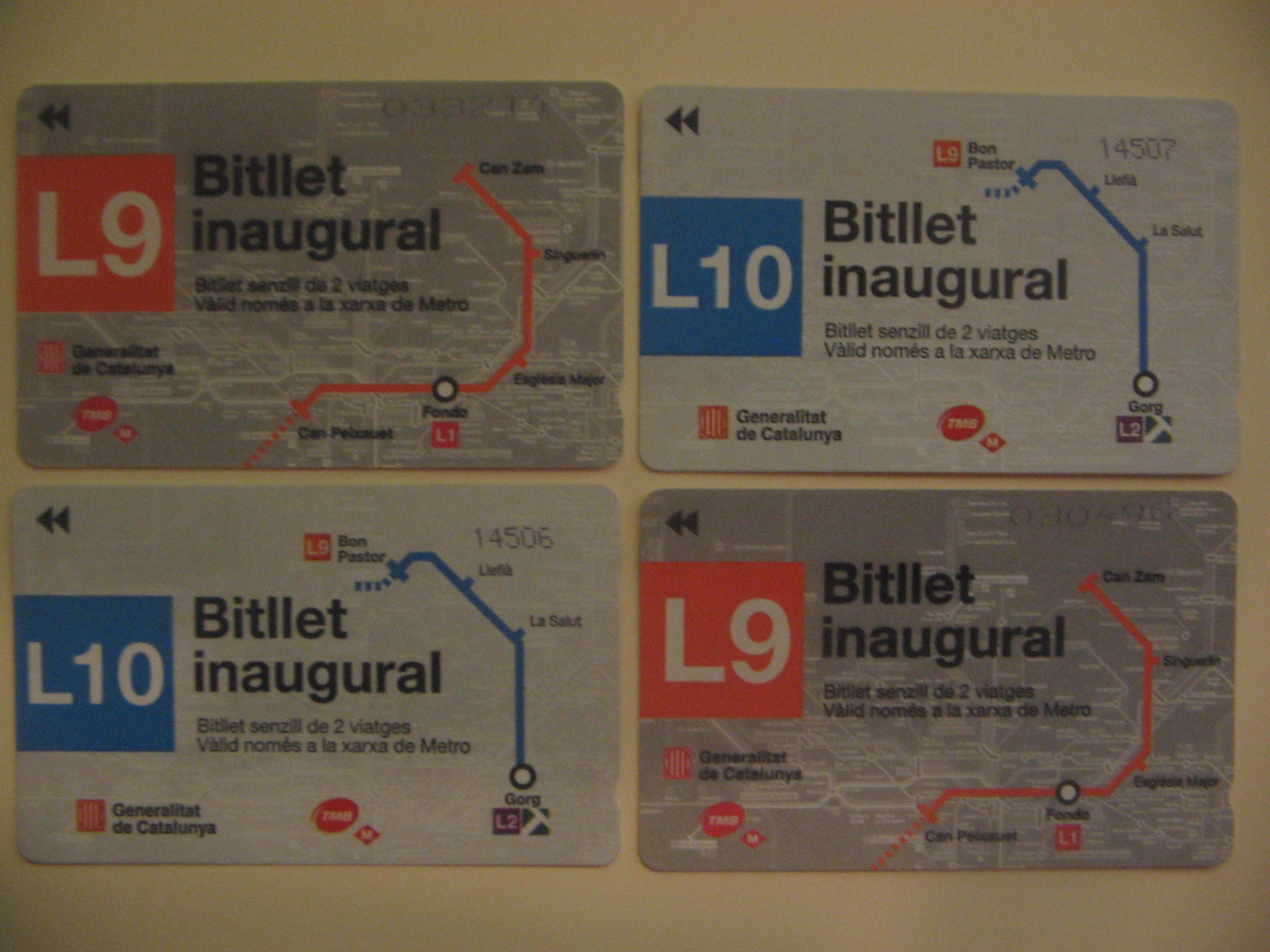 Bitllets inaugurals L9 i L10.